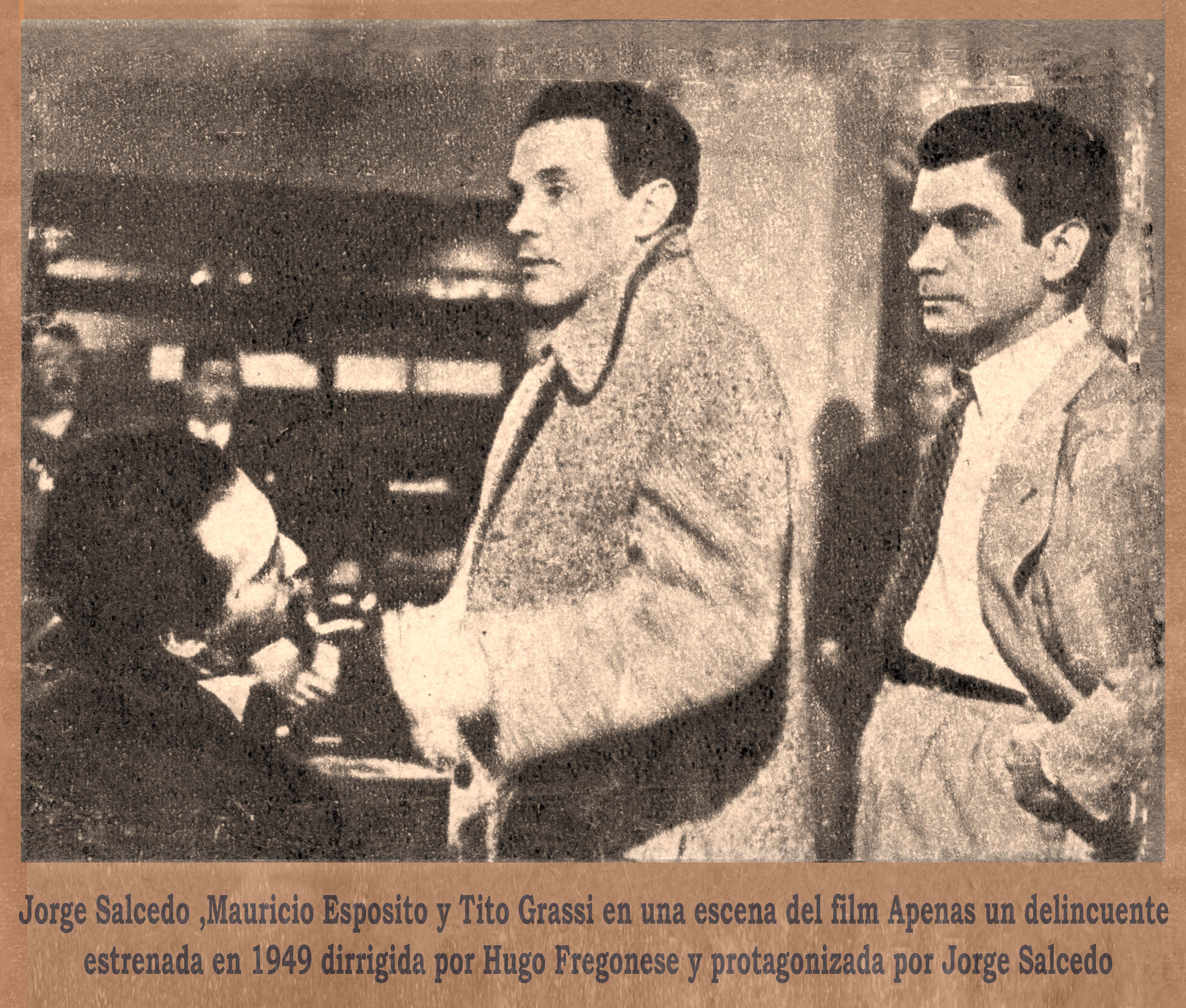 Jorge Salcedo Tito Grassi y Mauricio Esposito en una escena del film Apenas un delincuente, dirigida por Hugo Fregonese